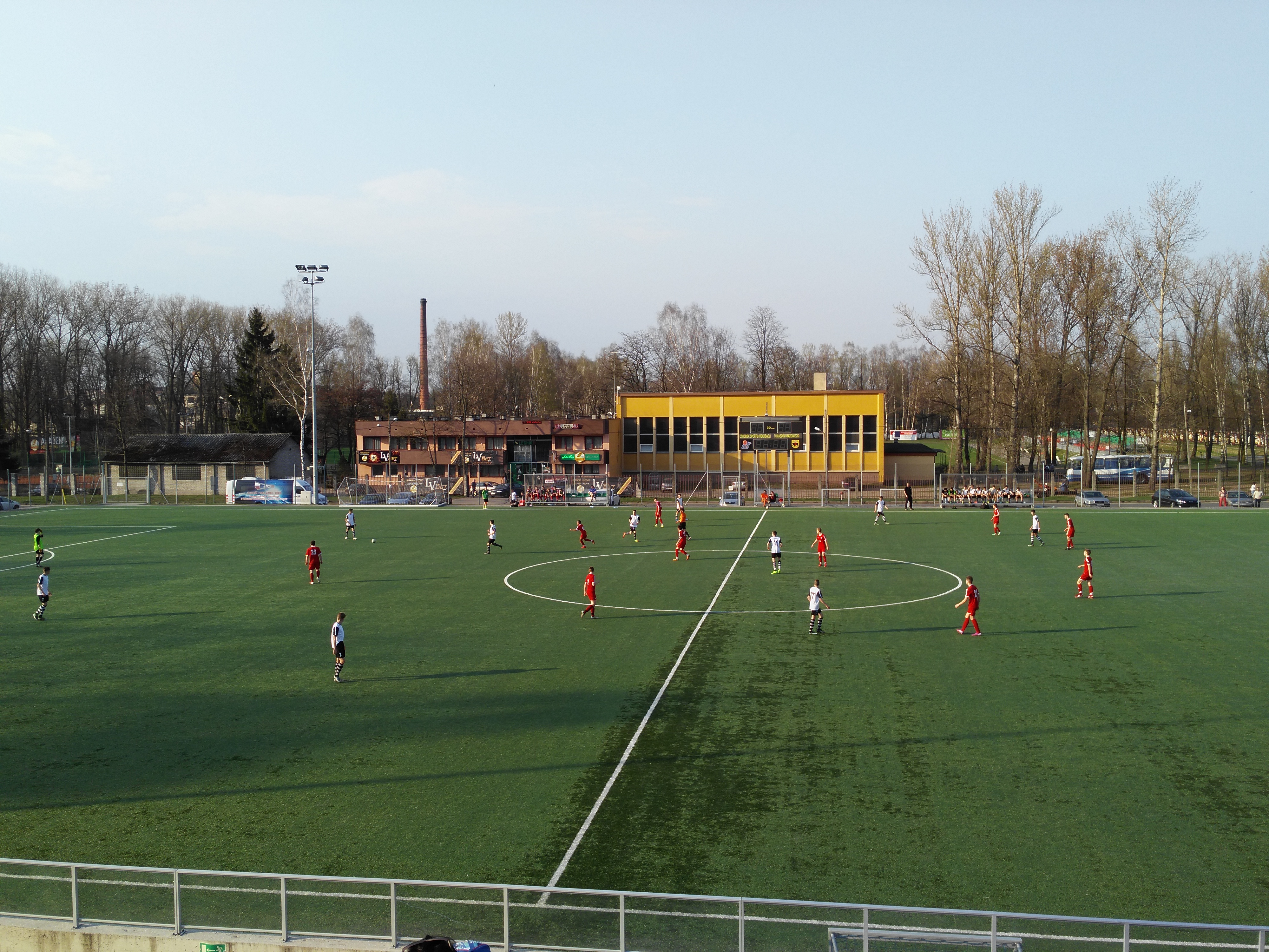 Jeden z trzech stadionów klubu sportowego Lechia w Tomaszowie Mazowieckim, widok z trybun